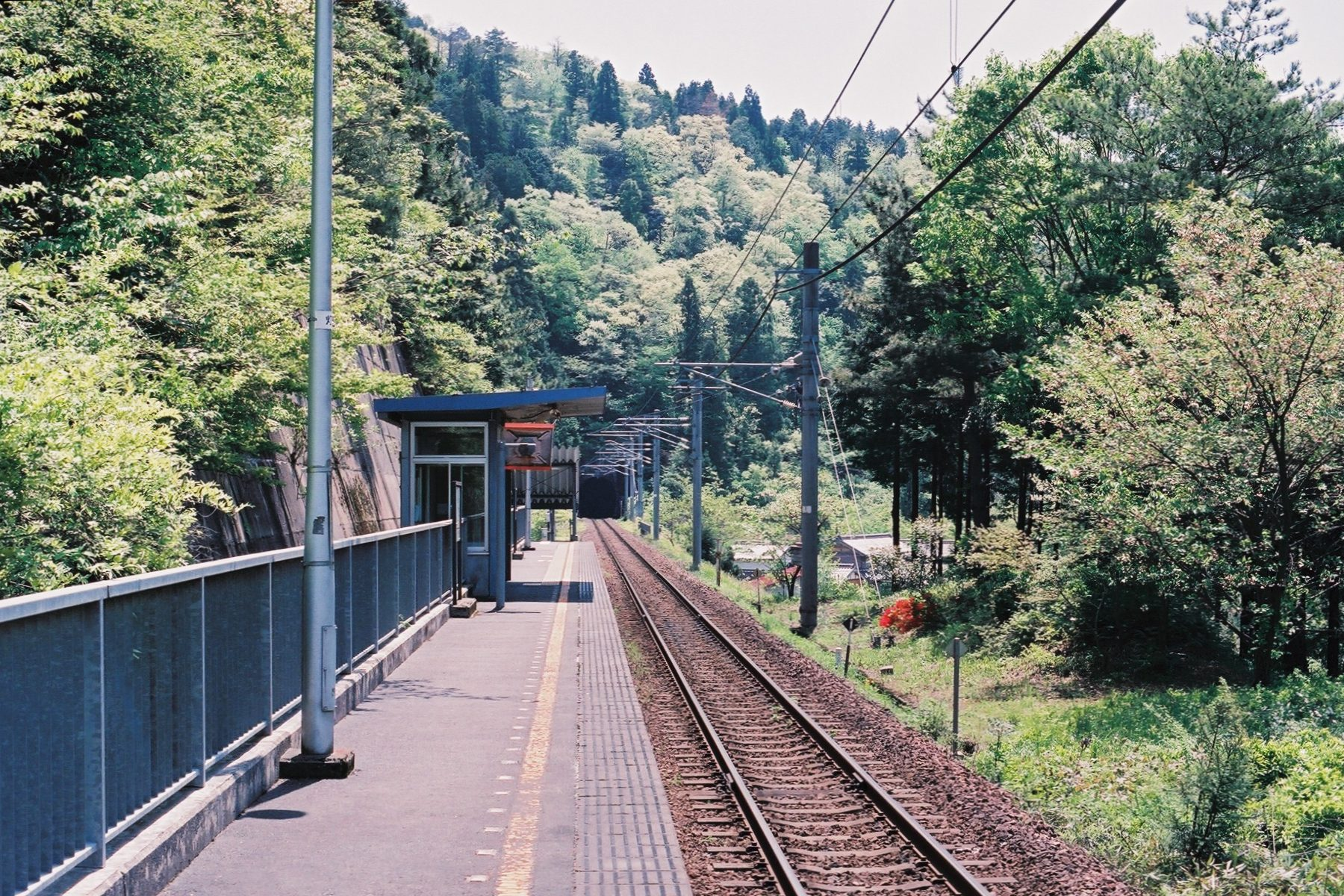 北近畿タンゴ鉄道宮福線辛皮駅